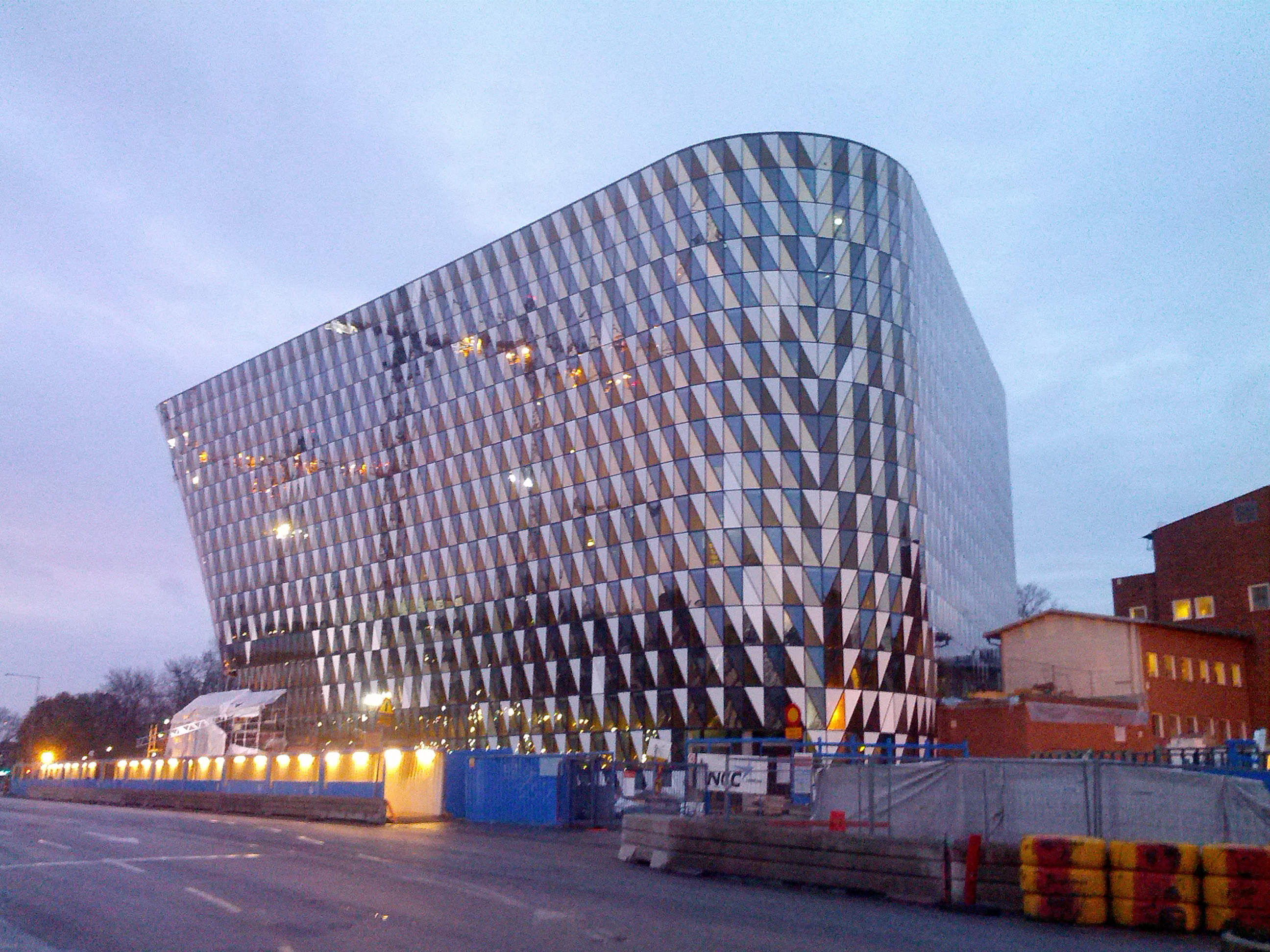 Karolinska institutet aula